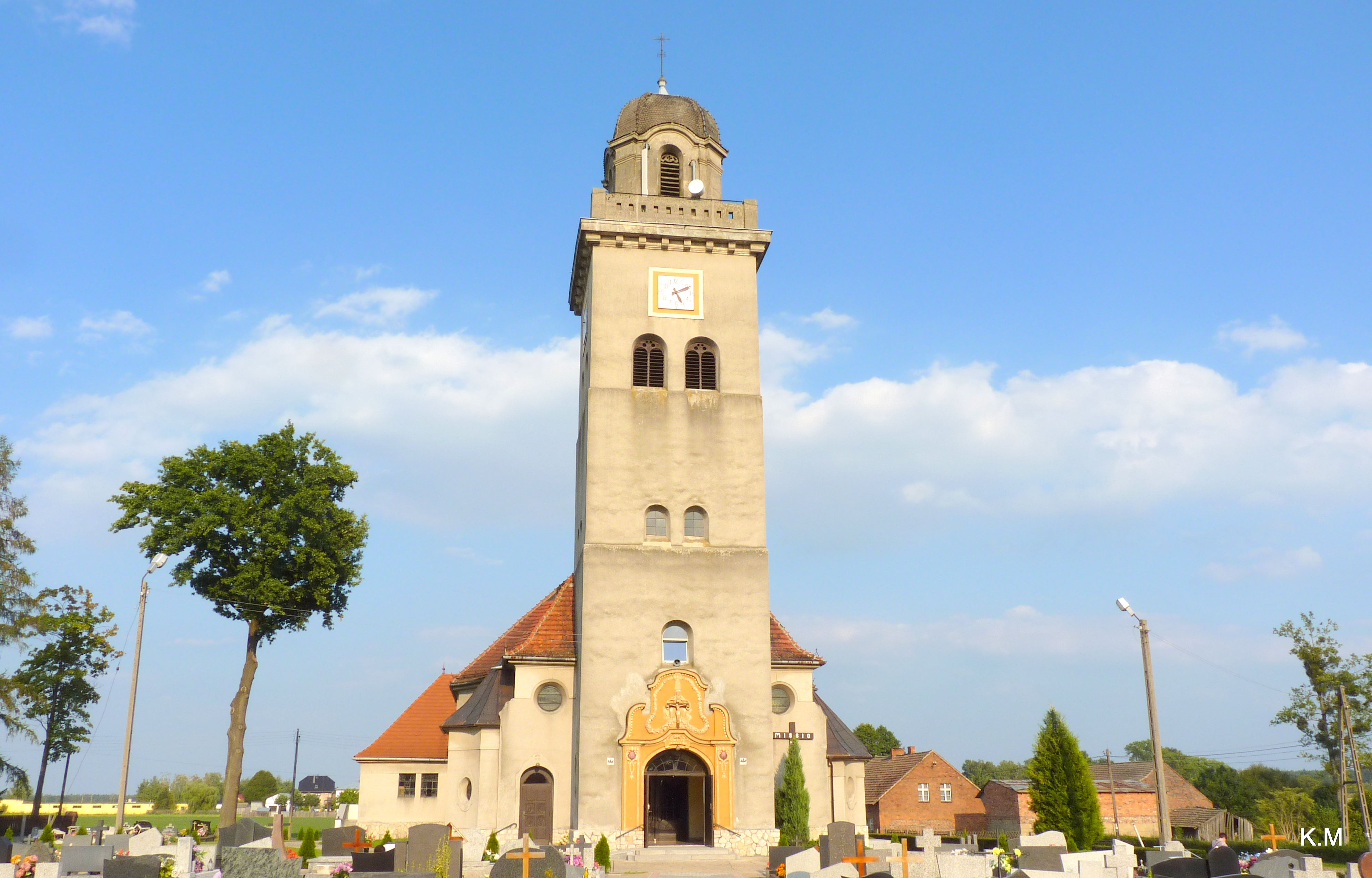 Parafia Rzymskokatolicka p.w Nawiedzenia N M P w Łomnicy